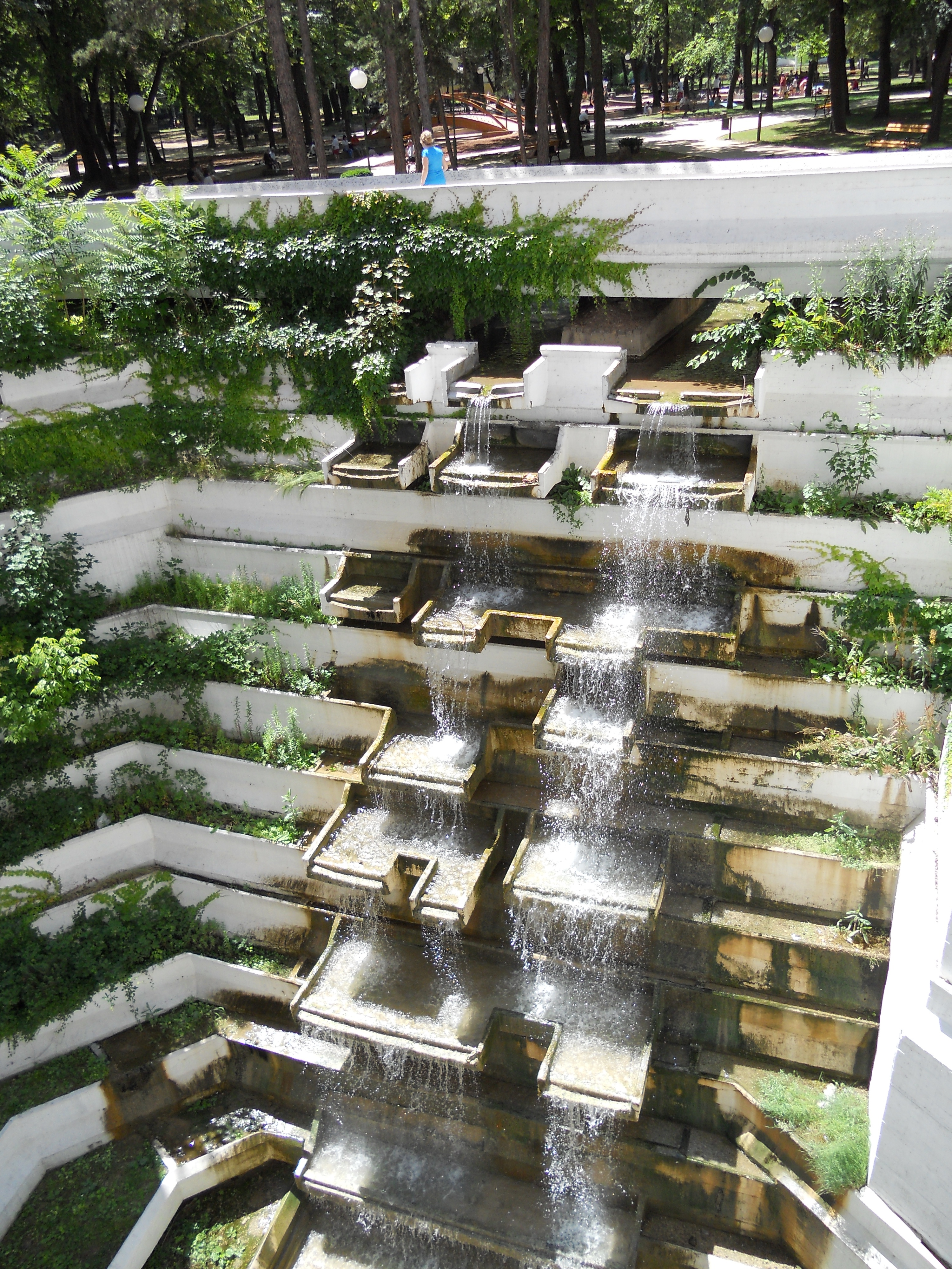 Vodopad na otseku bigrene terase ispred stacionra „Radon“ u Niškoj Banji. Autor: dr Milorad Dimić, Niš, Srbija 17. jun 2012.